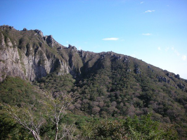 Hallasan, Jeju-do, South Korea.